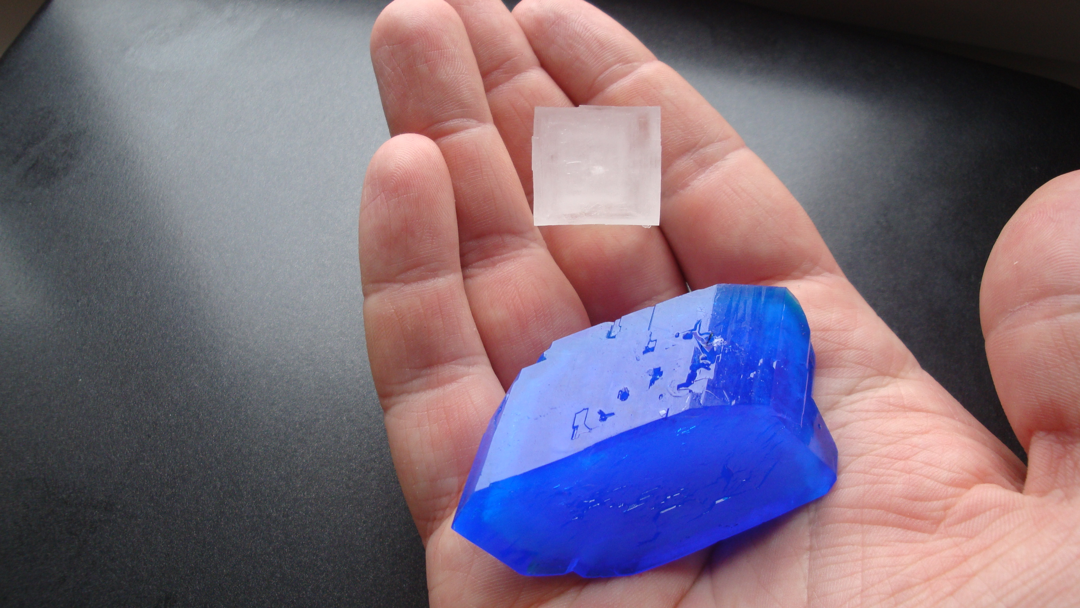 Vaskvitrioli ja silviniidi monokristallid. Kristallide kasvatamise aeg on umbes kaks kuud.